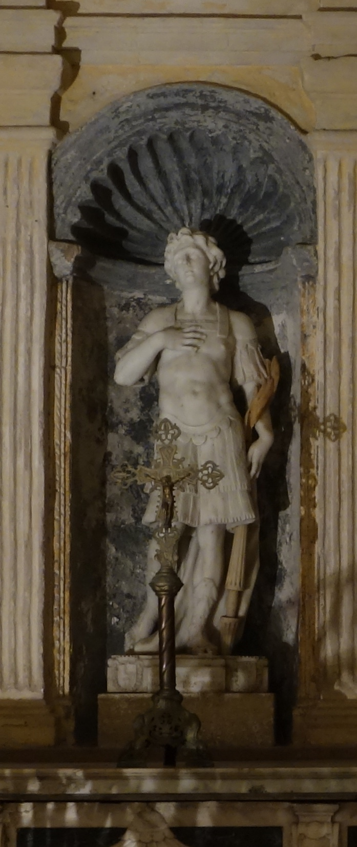 San Gavino